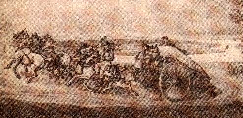 Attelage de chasse-marées picards au XVIIIe ou au XIXe siècle, lithographie du comte Arthur du Passage conservée au musée Boucher de Perthes, à Abbeville.